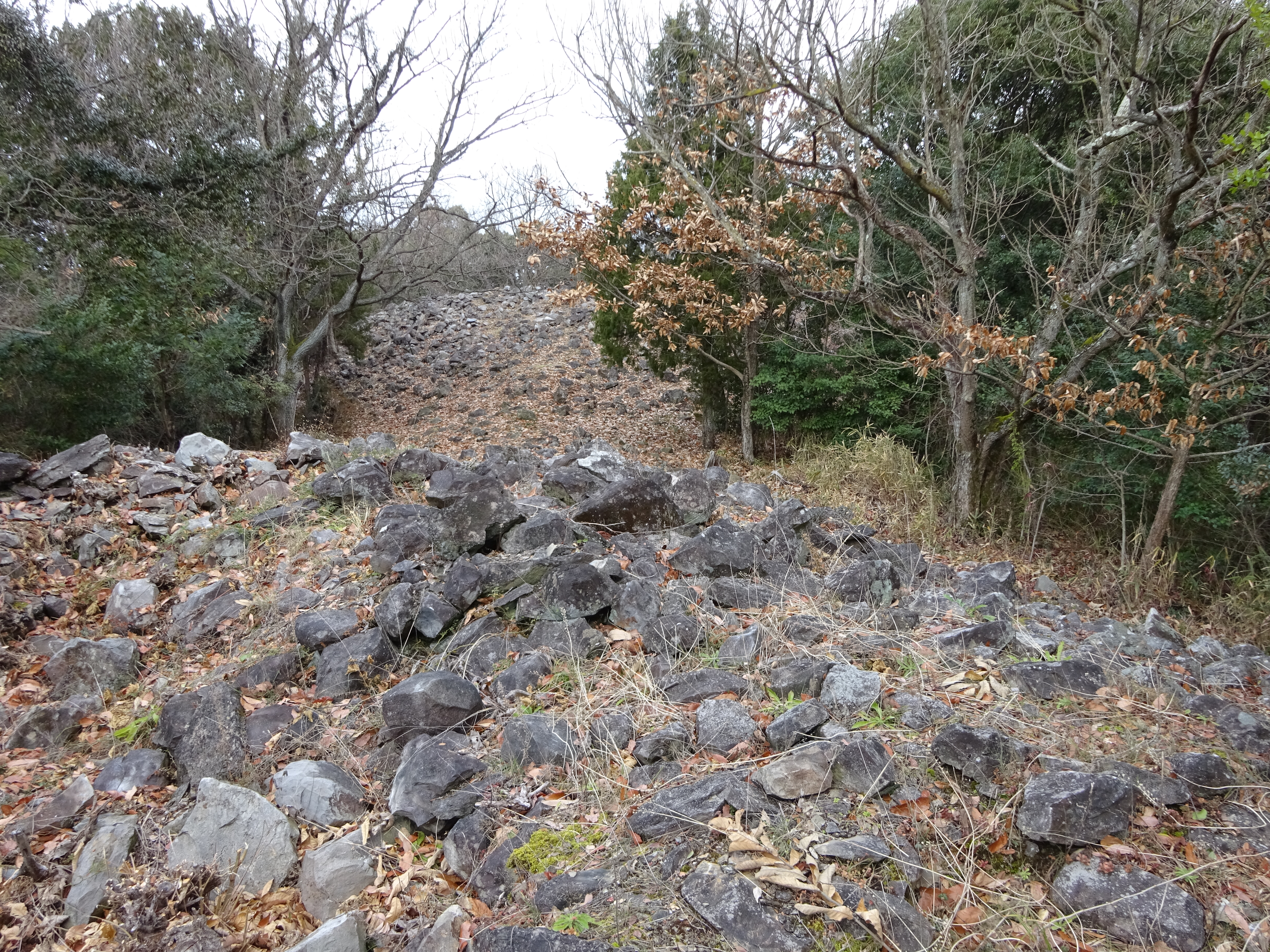 積石塚の猫塚古墳（全長96ｍ・双方中円墳）を突出部側より望む